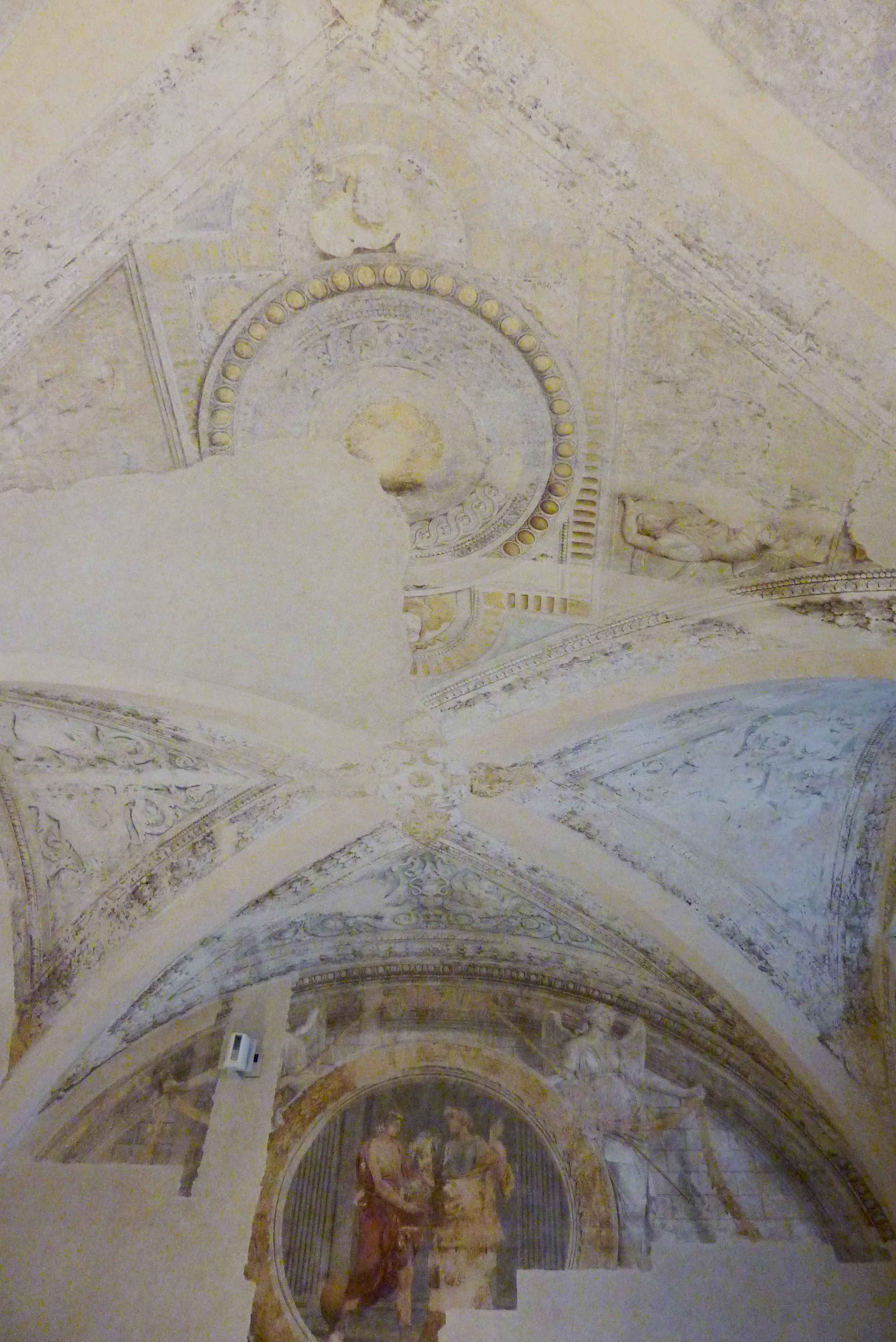 Hôtel de Saint-Aignan, 71, rue du Temple im 3. Arrondissement von Paris, ehemaliges Speisezimmer mit Wandmalereien, vor 1650, Rémy Vuibert (1600−1652) zugeschrieben